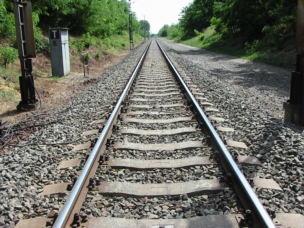 Budapest-Kelebia vasútvonal 171 szelvényű térközjelzője (Dunaharaszti–Taksony állomások között)